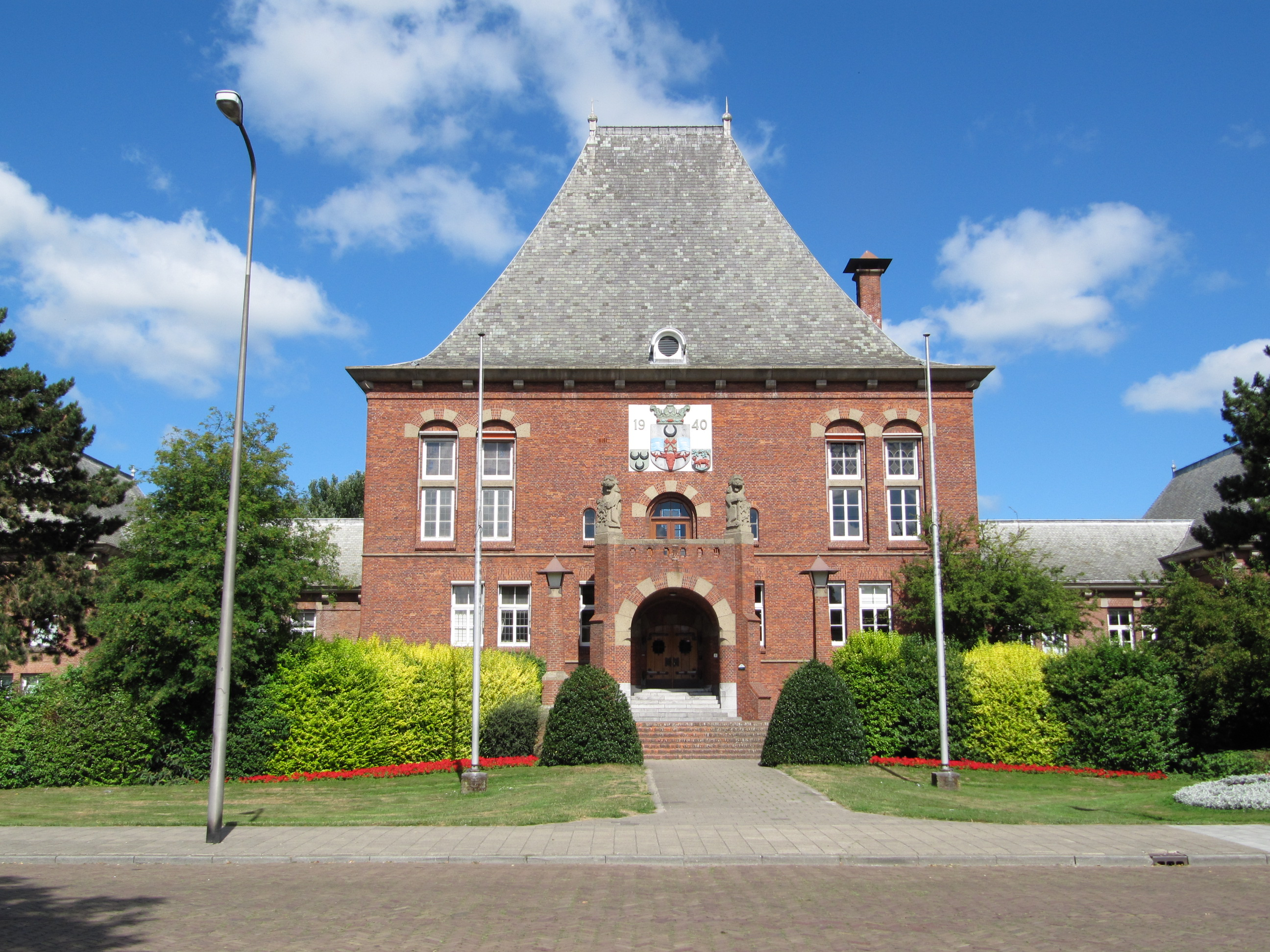 Leidschendam - Raadhuisplein 1.jpg, rijksmonument